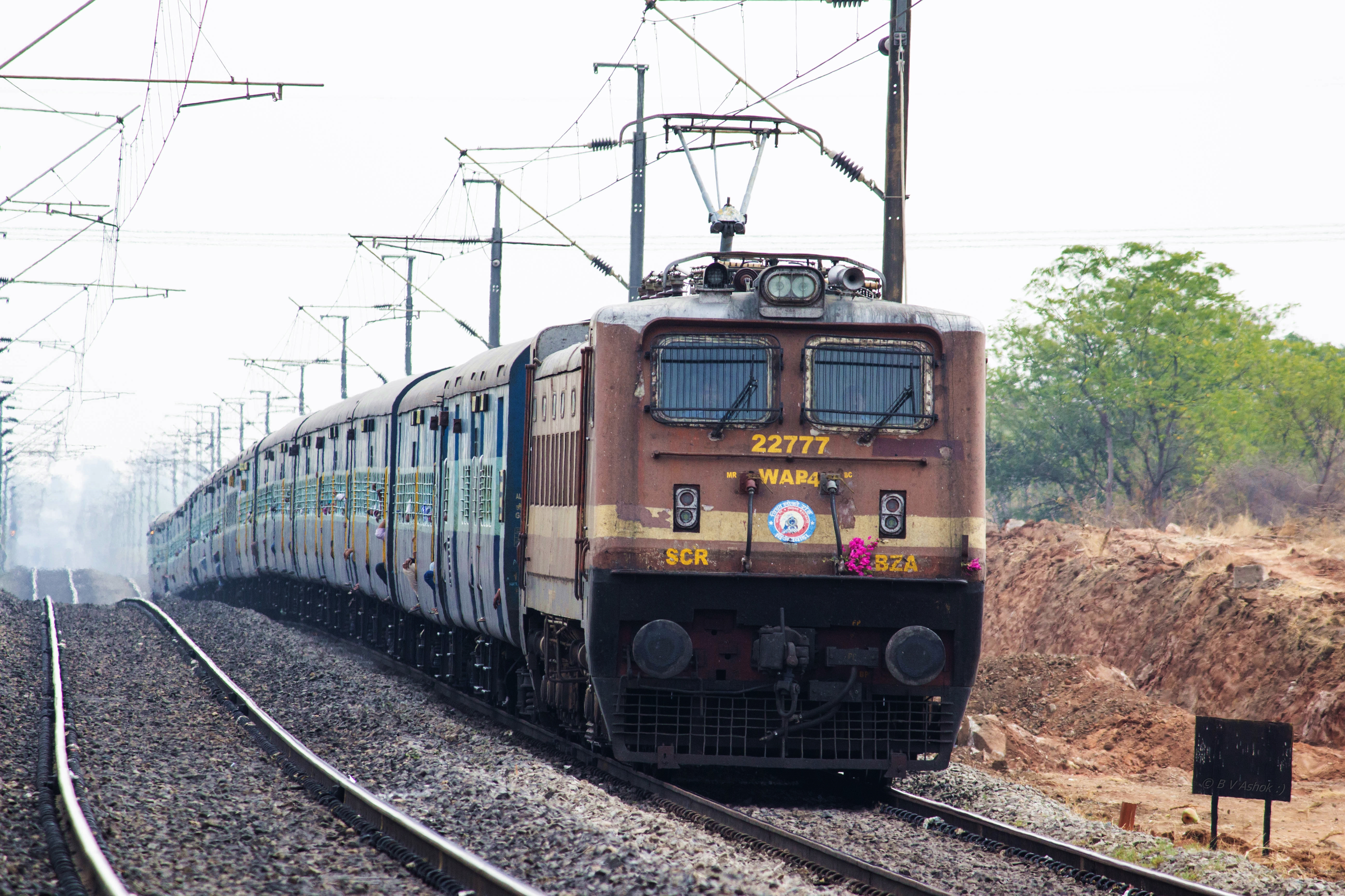 Image found in Flickr. Uploaded to be used in Wikipedia article about Bhagyanagar Express.Rajasekhar1961 (talk) 15:46, 1 June 2016 (UTC)